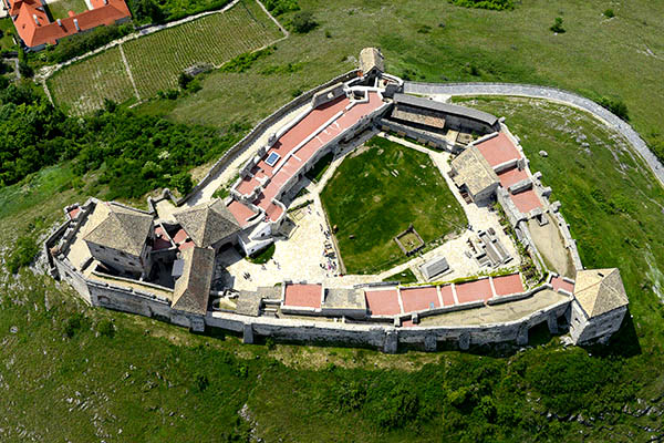 Sümegi vár, légi fotó